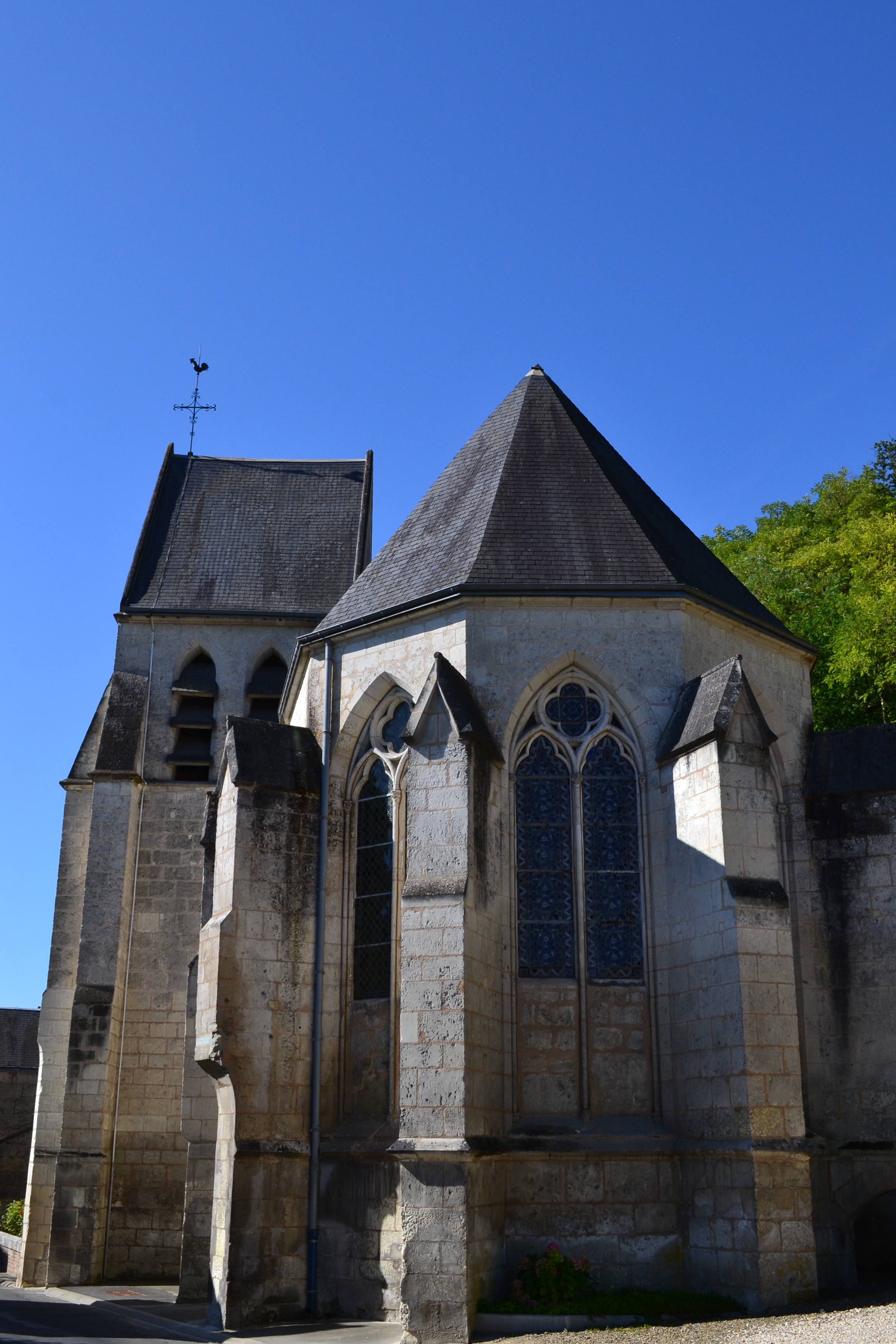 L'église se compose d'une nef et d'une abside polygonale, et est flanquée au sud d'un clocher. Le rez-de-chaussée de ce dernier forme une chapelle reliée à la nef par une arcade et voûtée sur croisée d'ogives.